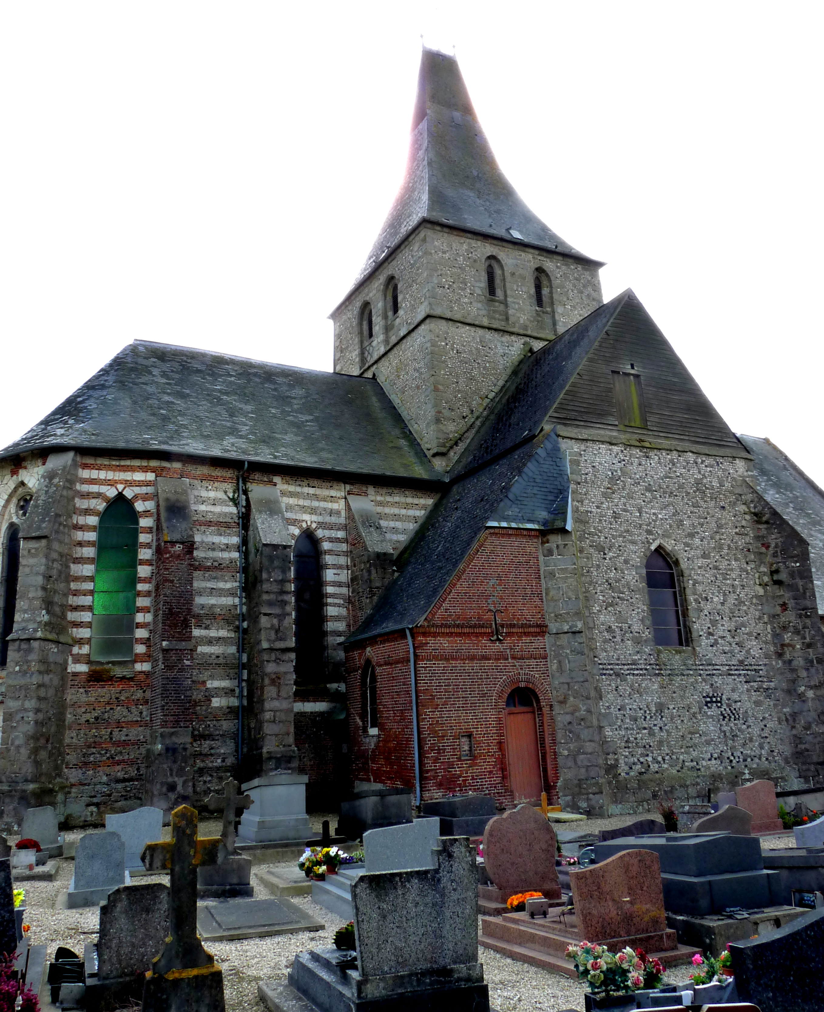 Église Notre-Dame de Notre-Dame-d'Aliermont .